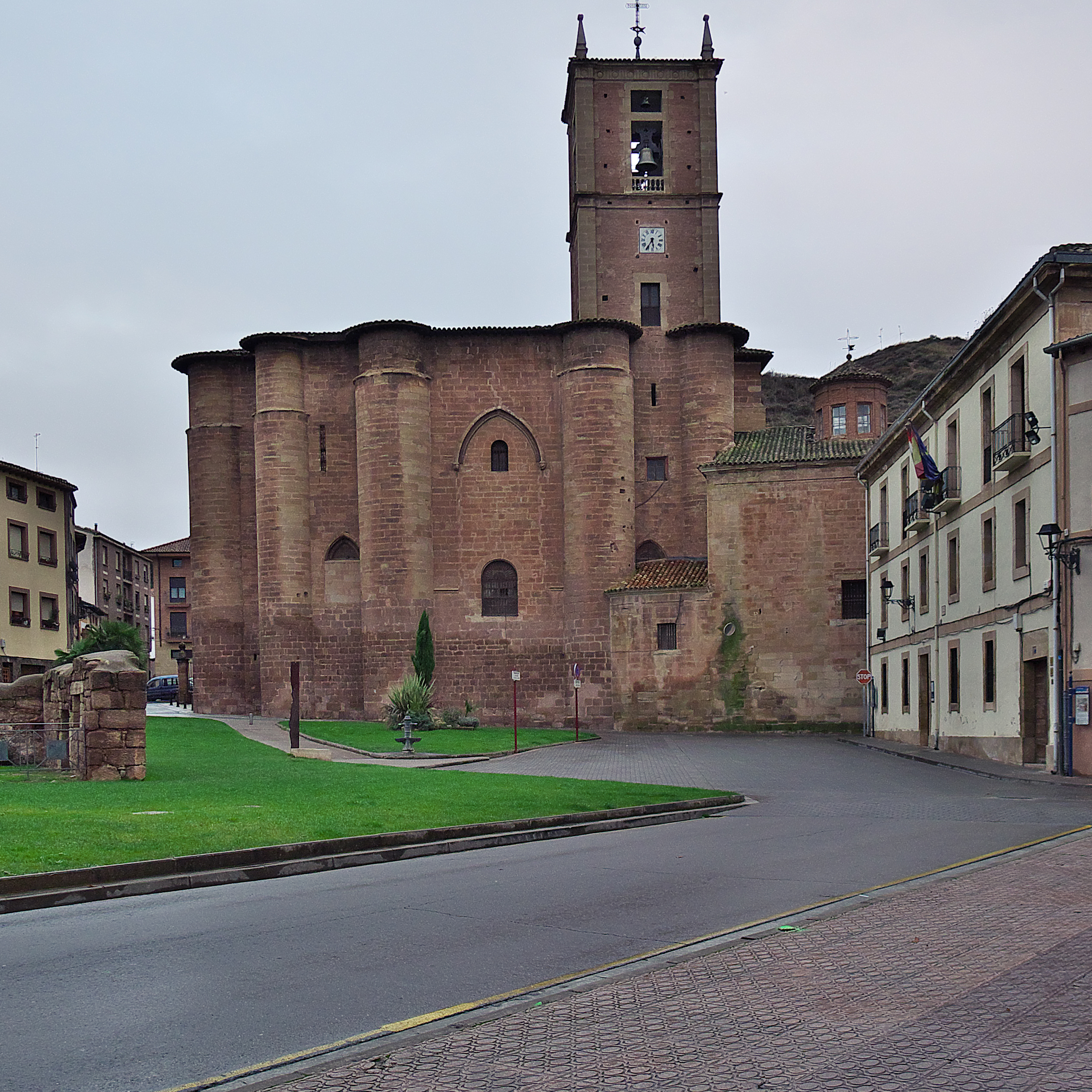 Plaza principal de la localidad con los edificios del Ayuntamiento y el Monasterio de Santa María la Real.